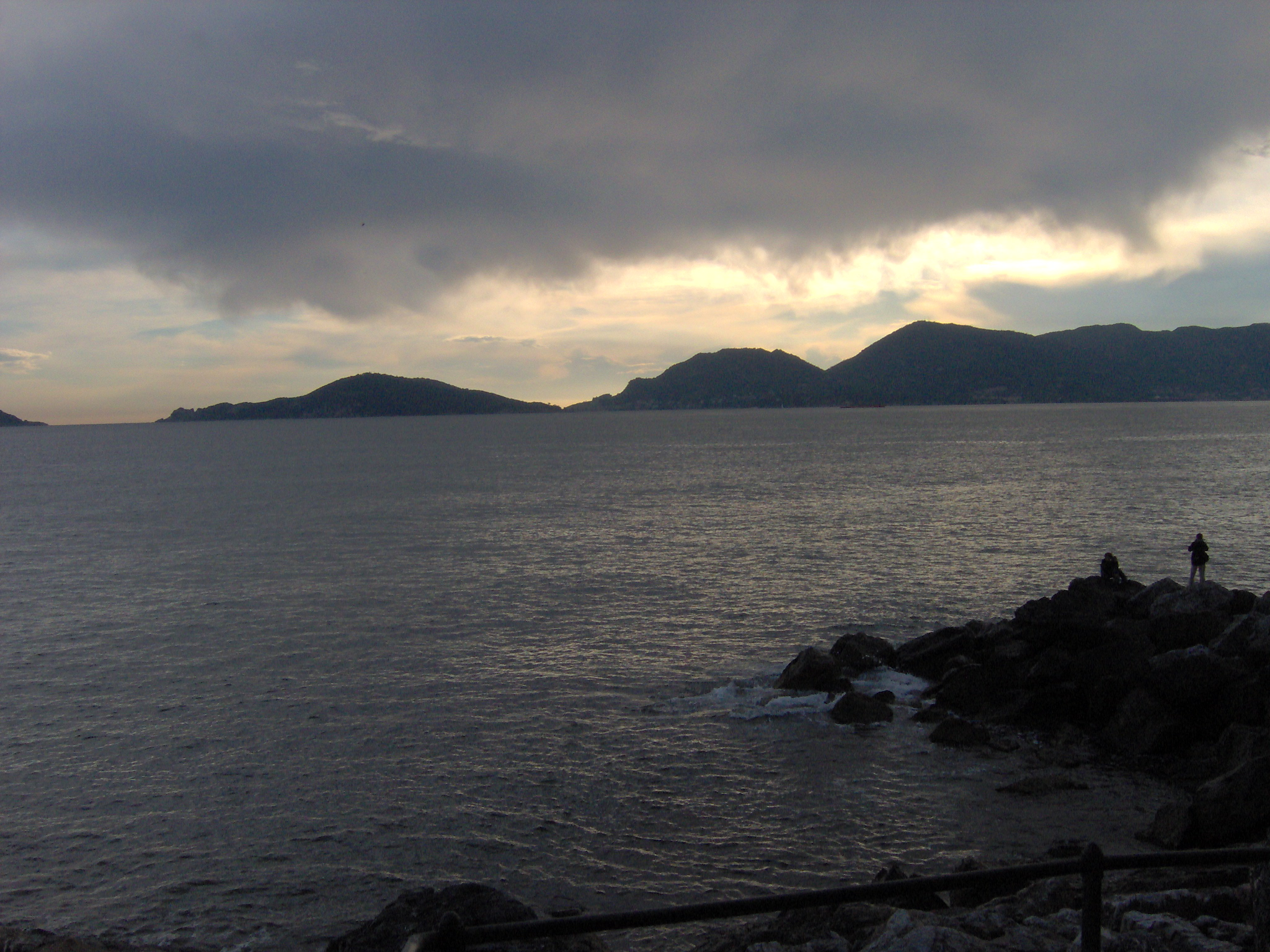 Ripresa del Golfo dei Poeti da Tellaro.